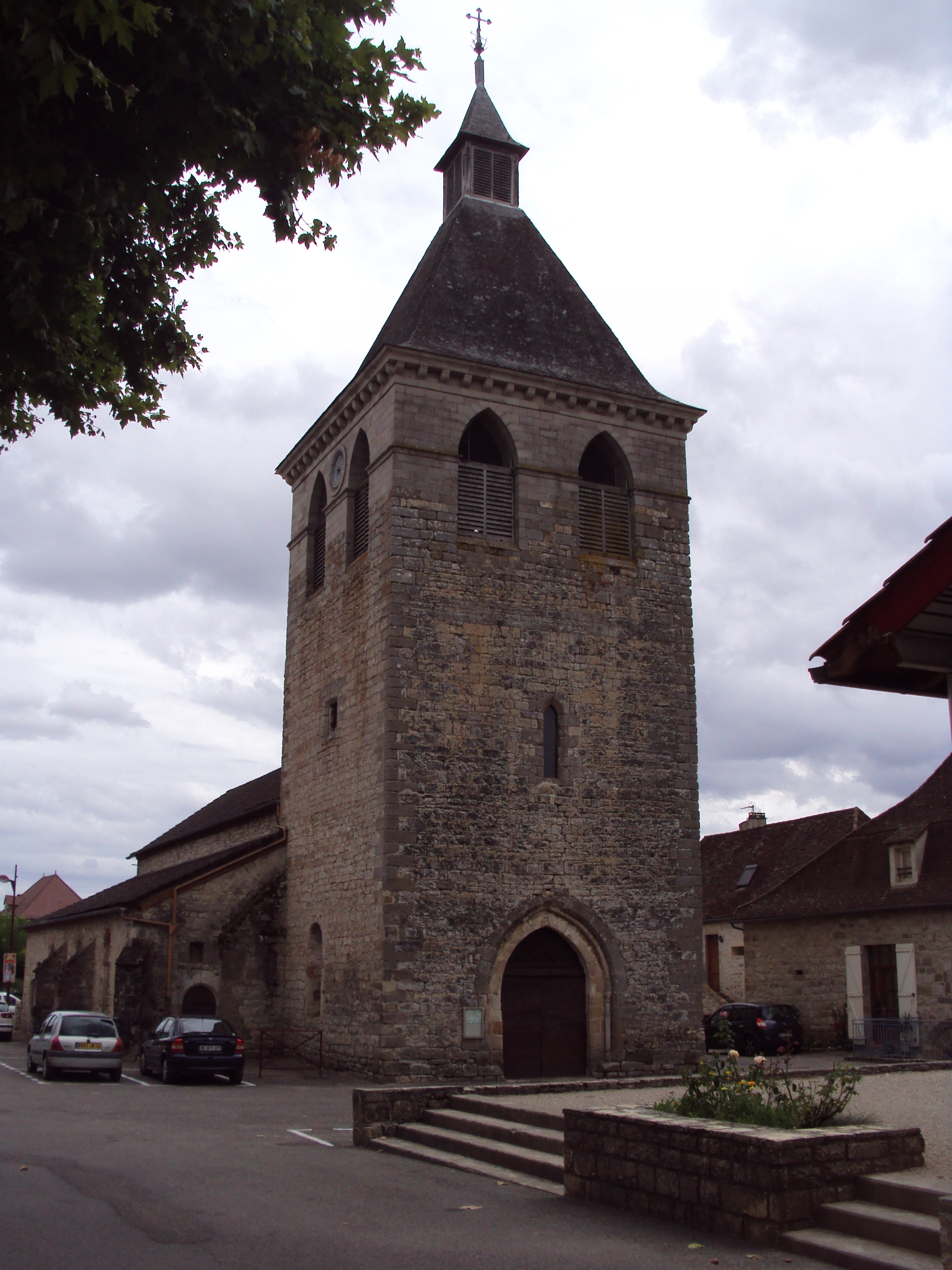 Puybrun - Eglise Saint-Blaise (XIIIème siècle)